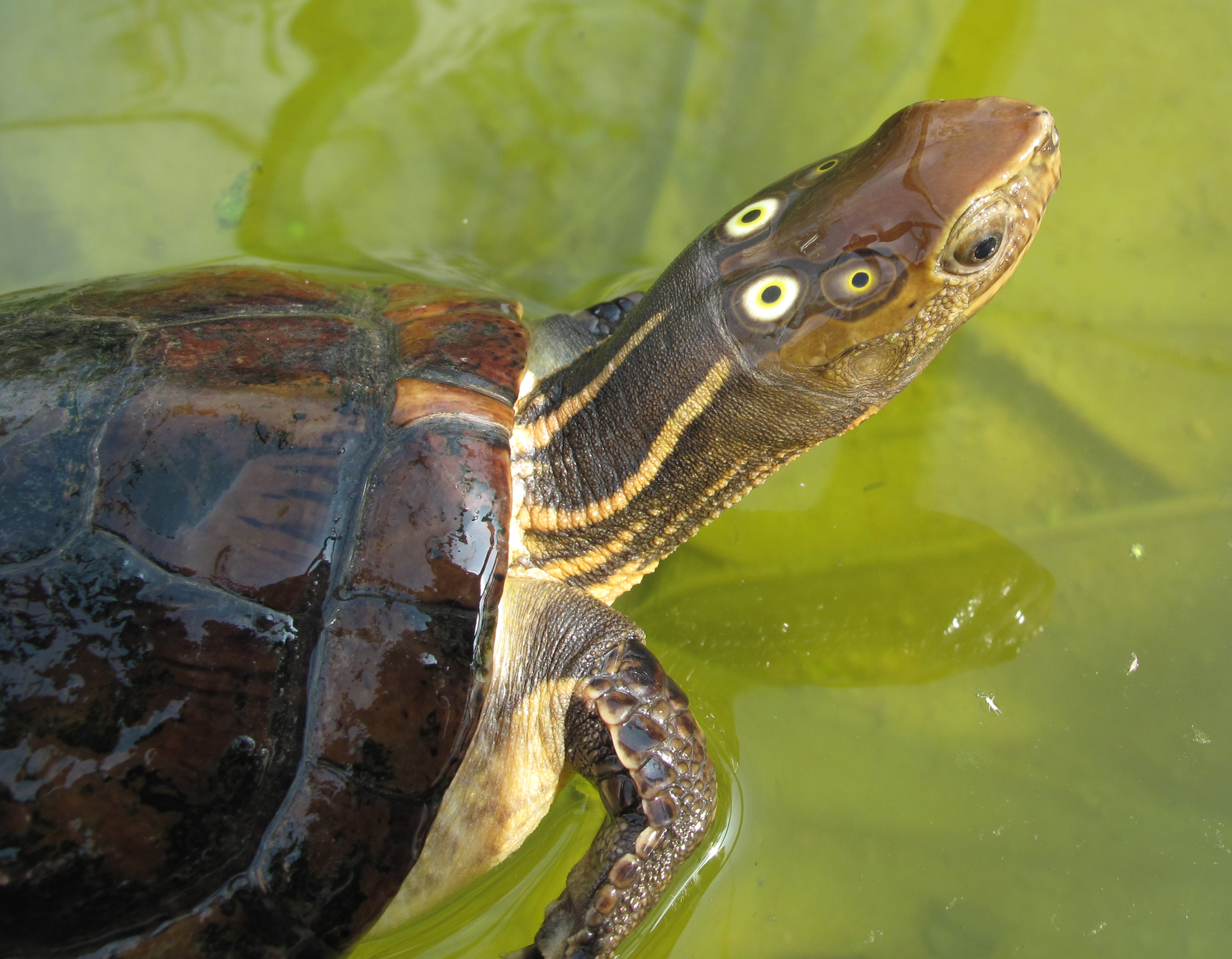 Spécimen femelle adulte.